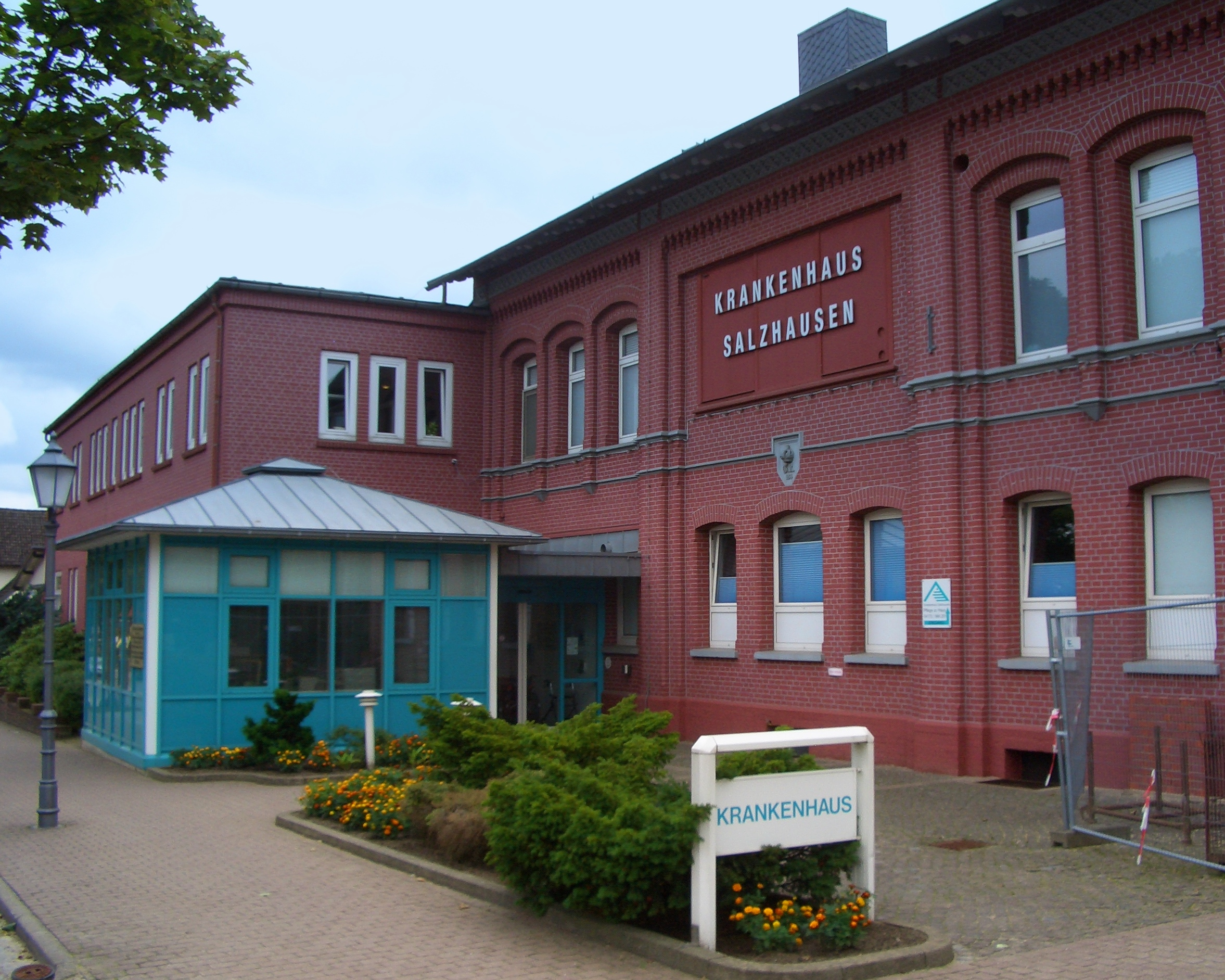 Krankenhaus Salzhausen, Niedersachsen, Deutschland